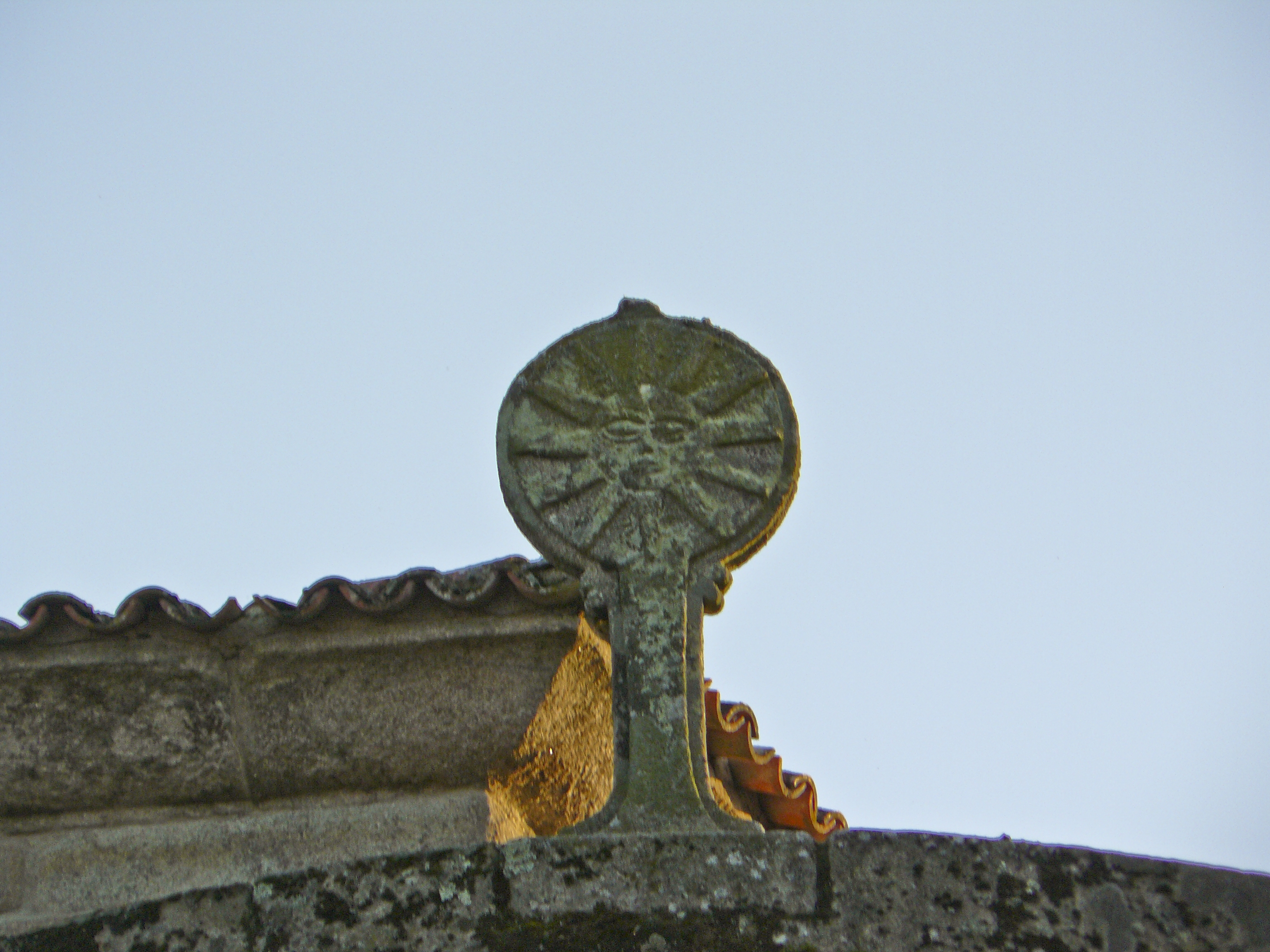 Reloxo de sol do Castelo de Vilamarín